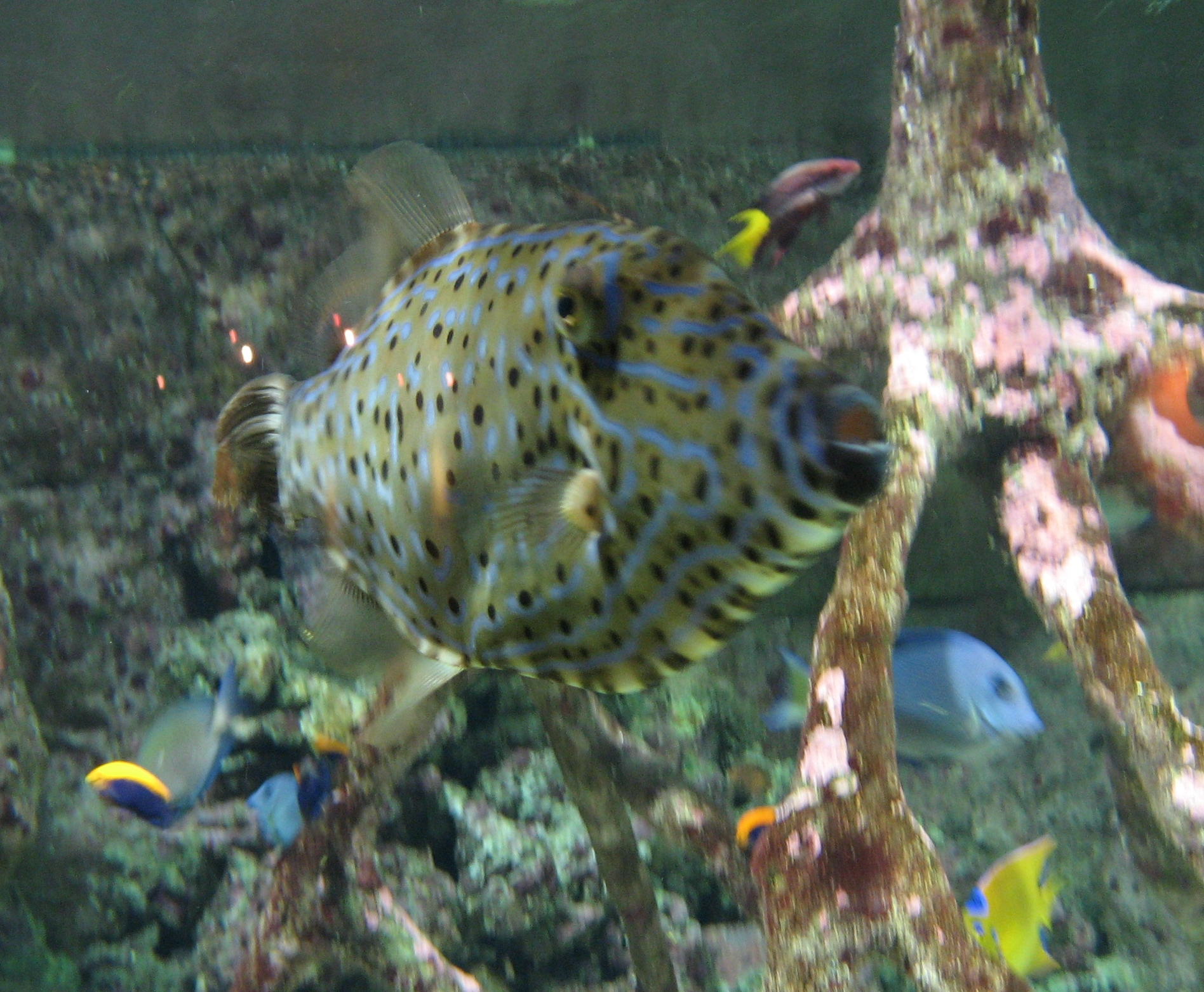 Aluterus scriptus in Aquarium Cinéaqua Map: 48° 51' 44" N 2° 17' 27" E